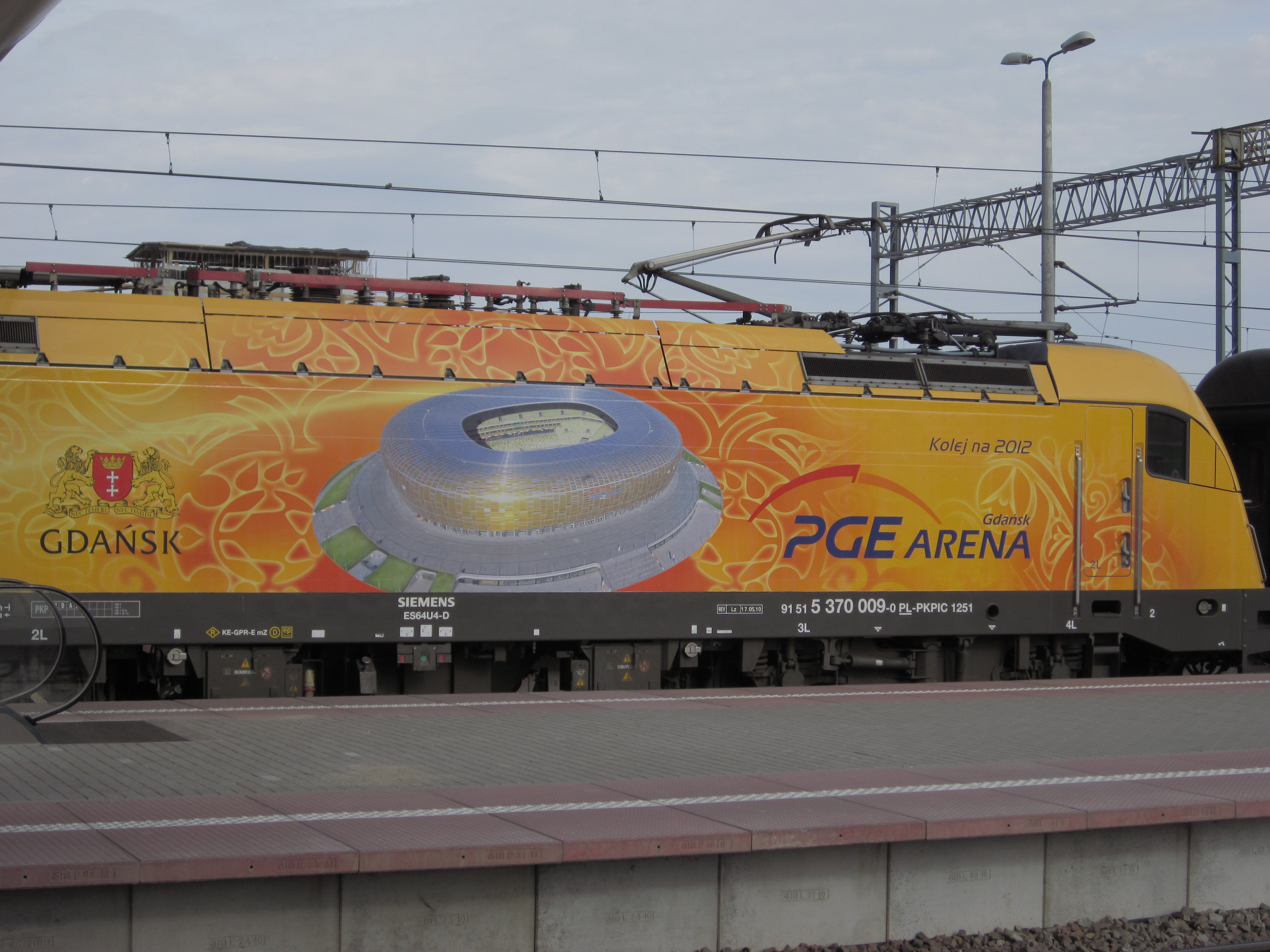 Jedna z polskich aren na których będą rozgrywane mecze EURO 2012, tu PGE Arena w Gdańsku.